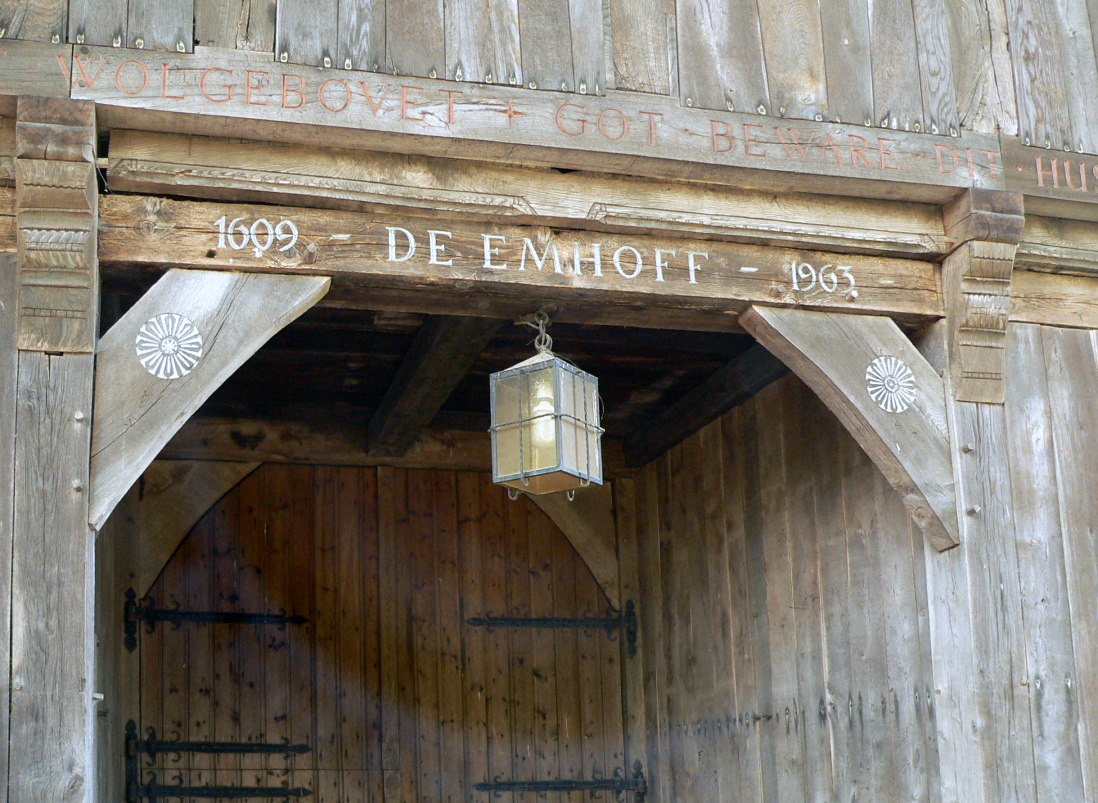 De Emhoff